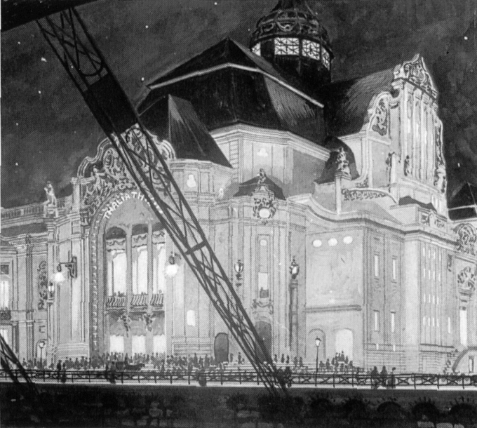 Wuppertaler Thalia-Theater auf dem Propekt zur der Eröffnung 1906